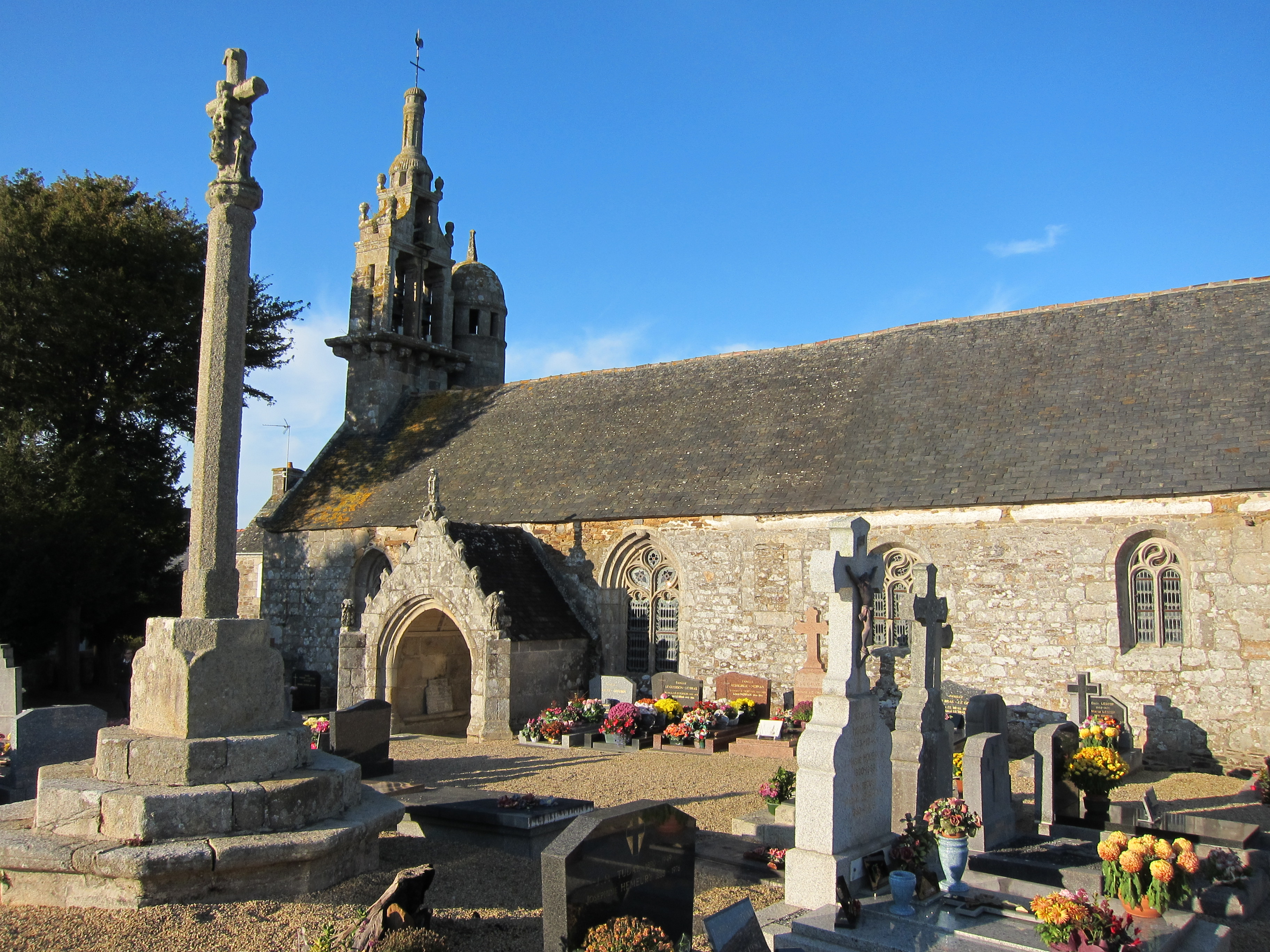 Église de Treduder Trégor clocher Atelier Beaumanoir calvaire cimetière porche pour le conseil de fabrique